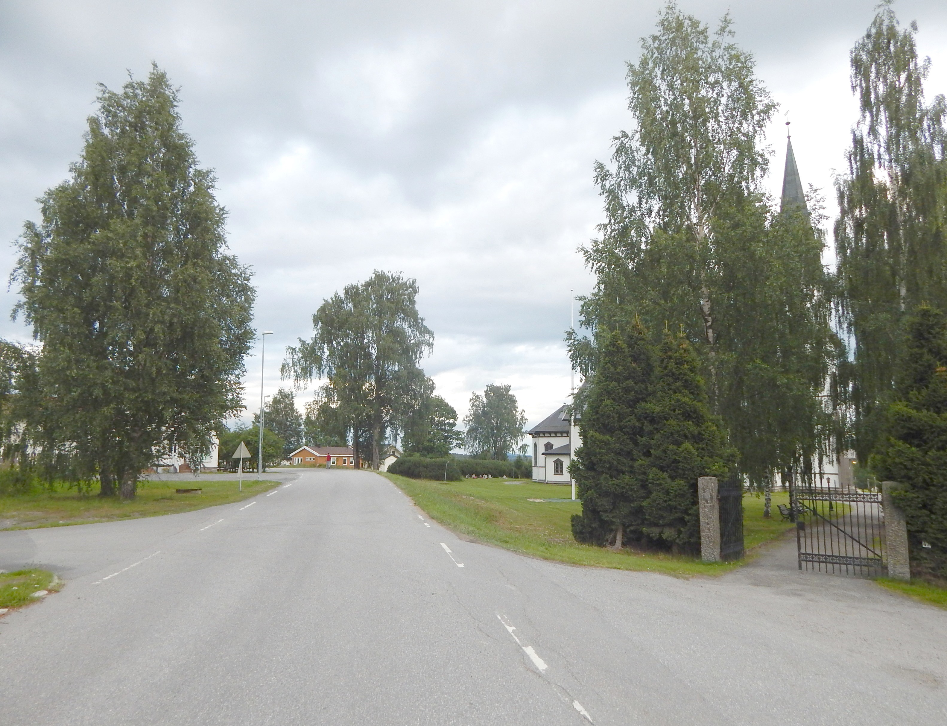 Fylkesvei 1928 (tidl. 263) forbi Sand kirke